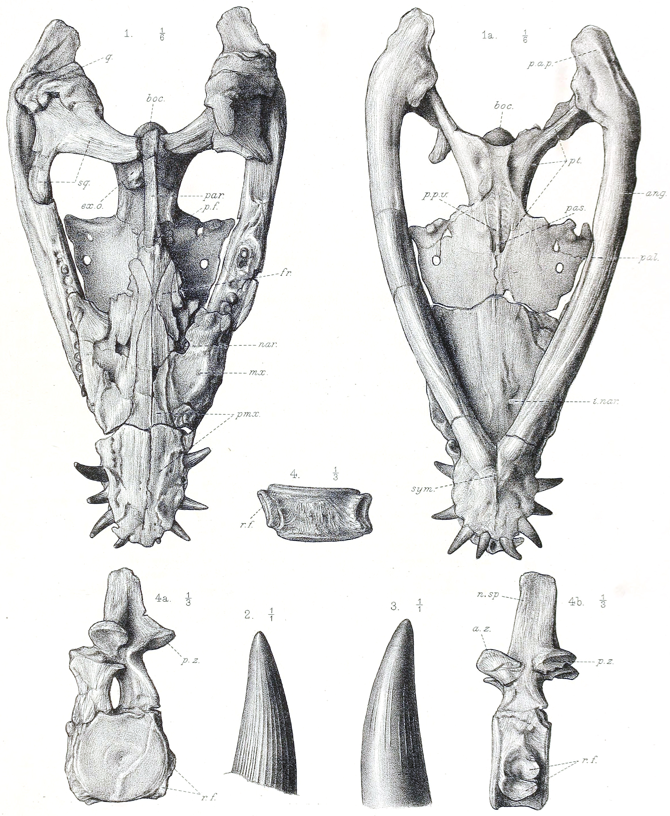 Simolestes skull.